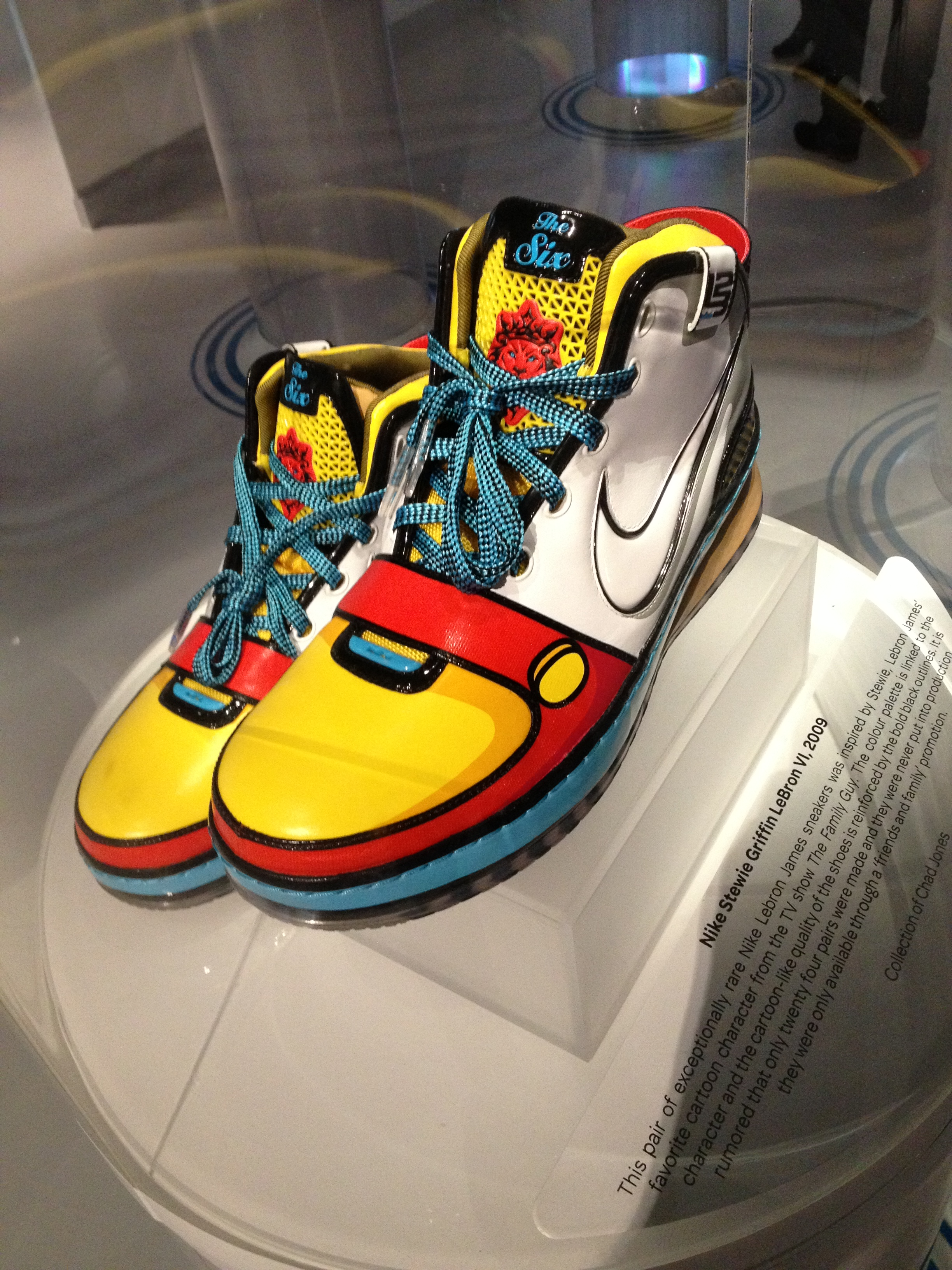 Bata Shoe Museum Toronto ON